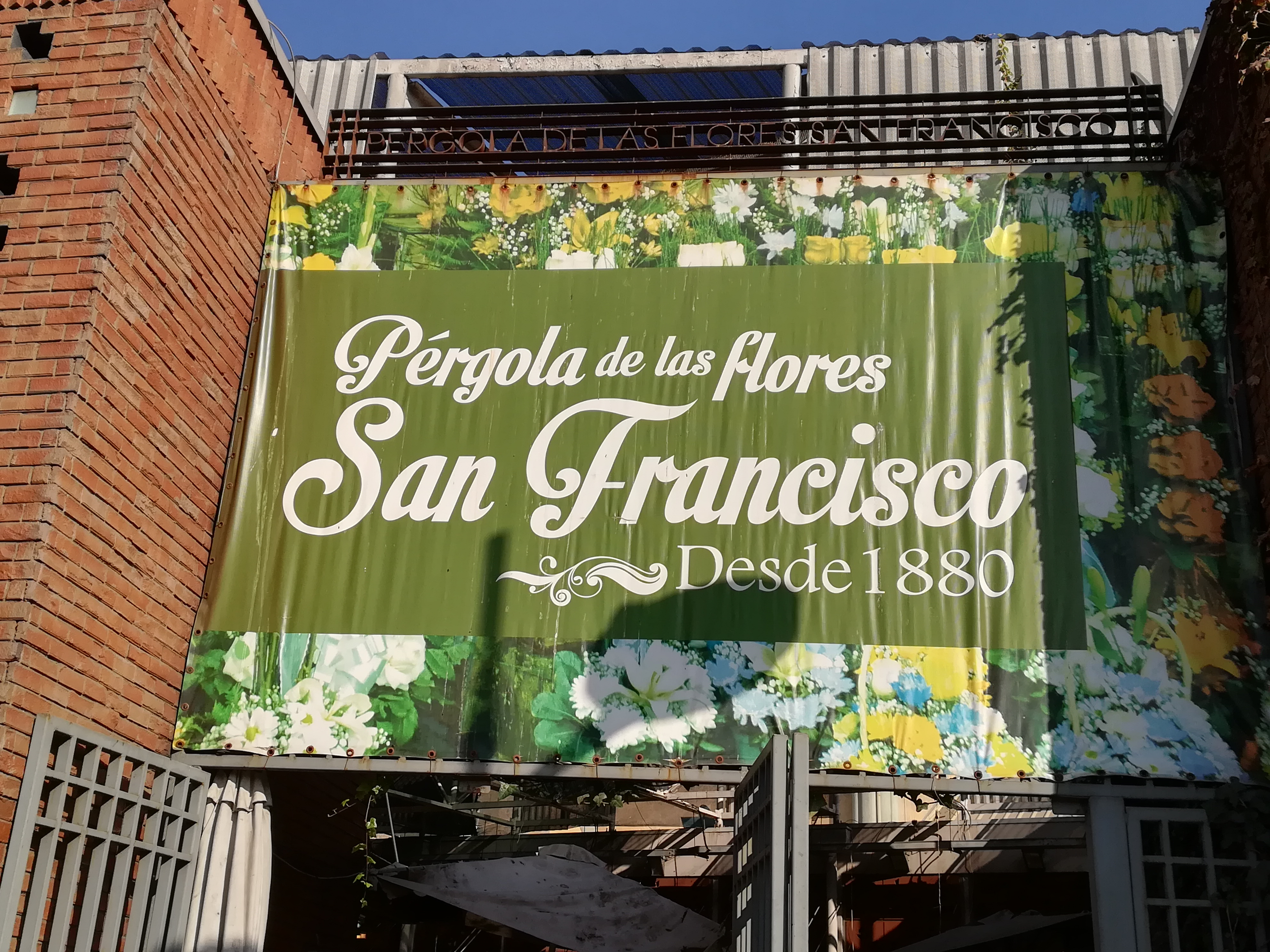 Letrero de entrada Pérgola de San Francisco